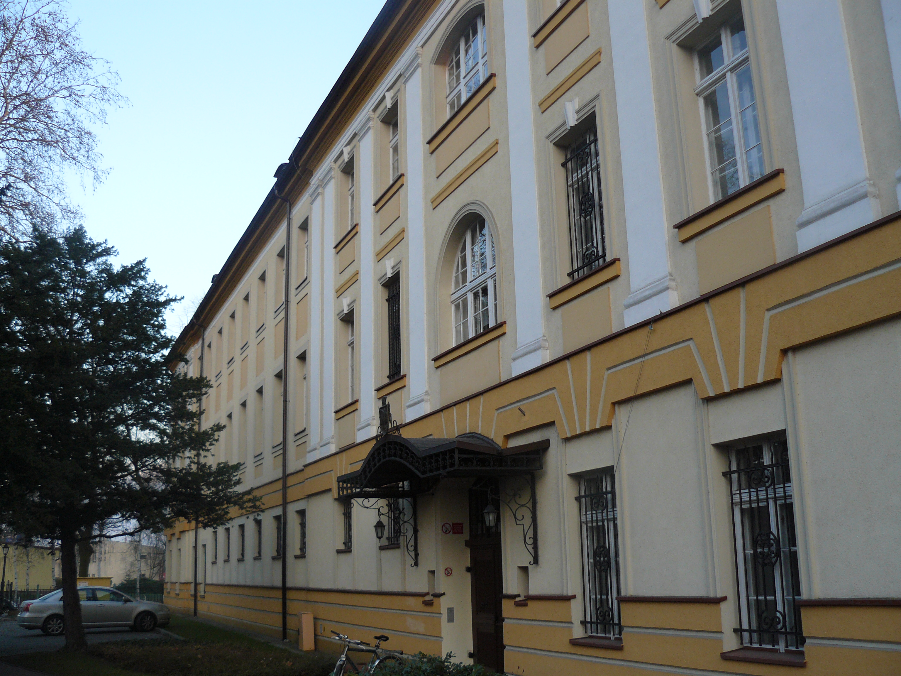 Gorzów Wielkopolski, ul. Teatralna 25 - dawny Krajowy Dom Ubogich z lat 1799 - 1801 i końca XIX w., obecnie siedziba Państwowej Wyższej Szkoły Zawodowej (zabytek nr 449/98)